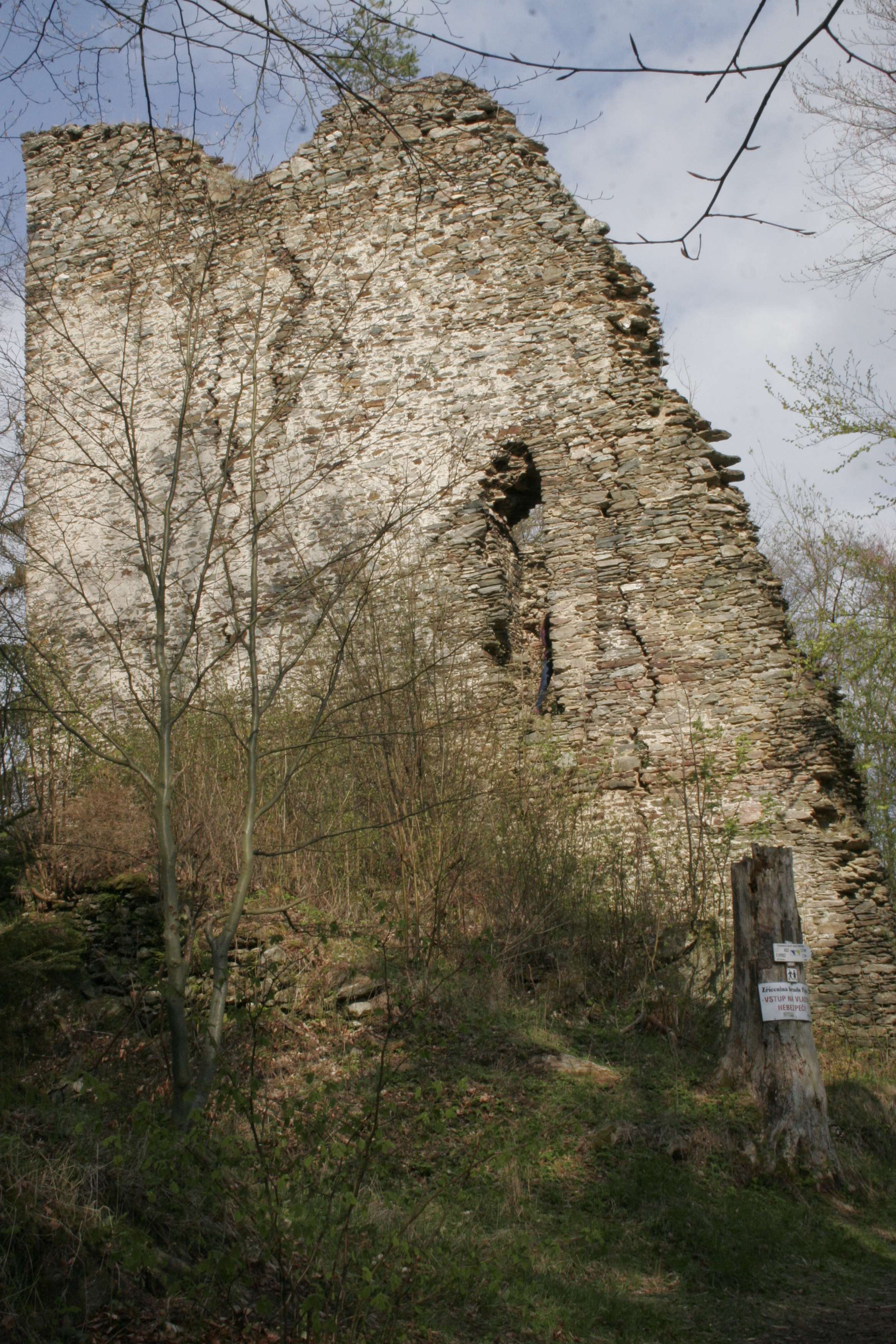 Hrad Pajrek, okres Klatovy, Česká republika.